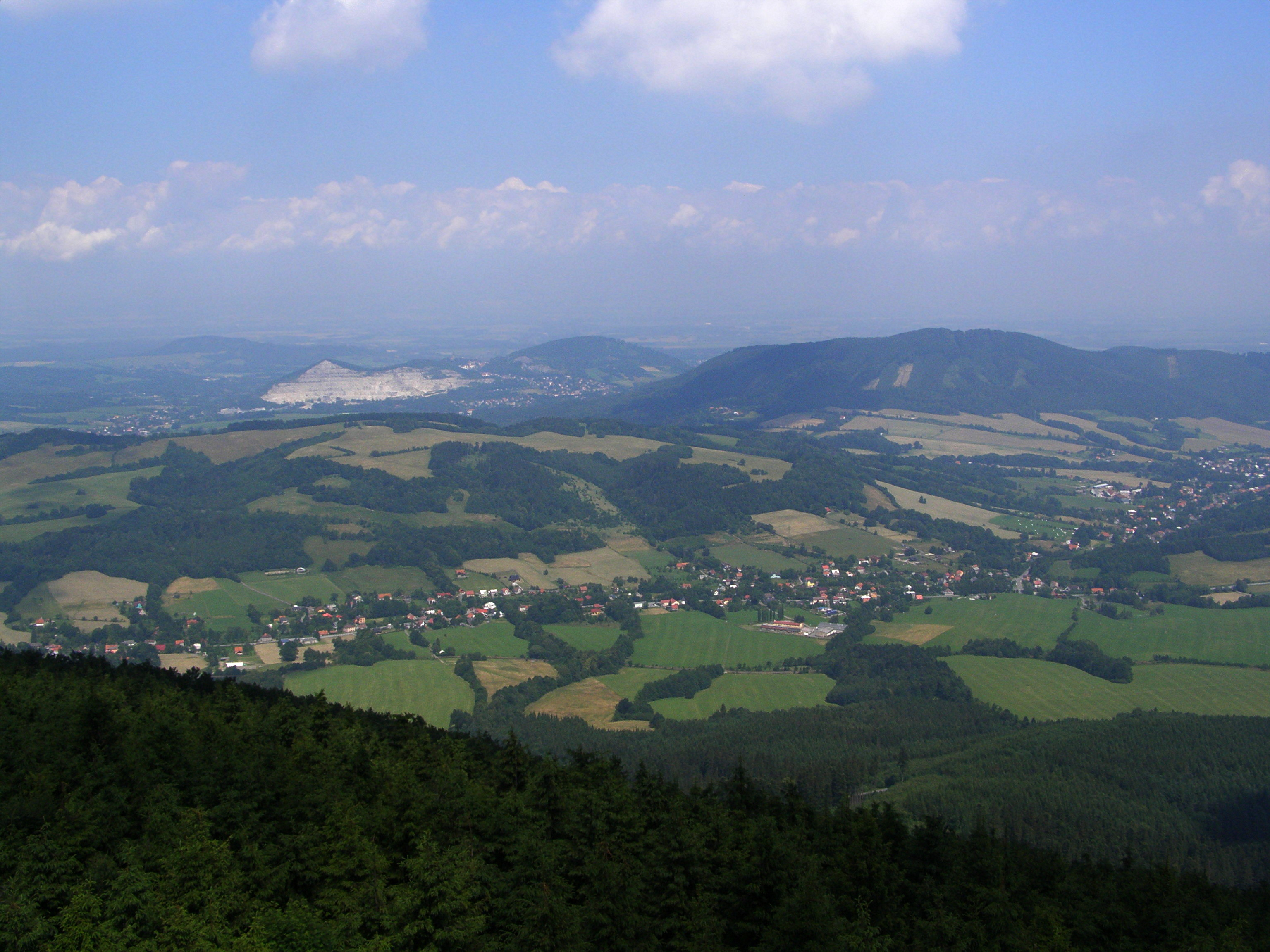 Veřovické vrchy, pohled z vrcholu Velký Javorník na sever: v pozadí vlevo vrchol Kotouč, uprostřed Bílá hora, vpravo Červený kámen, v popředí obec Bordovice (vlevo) a Lichnov (vpravo)